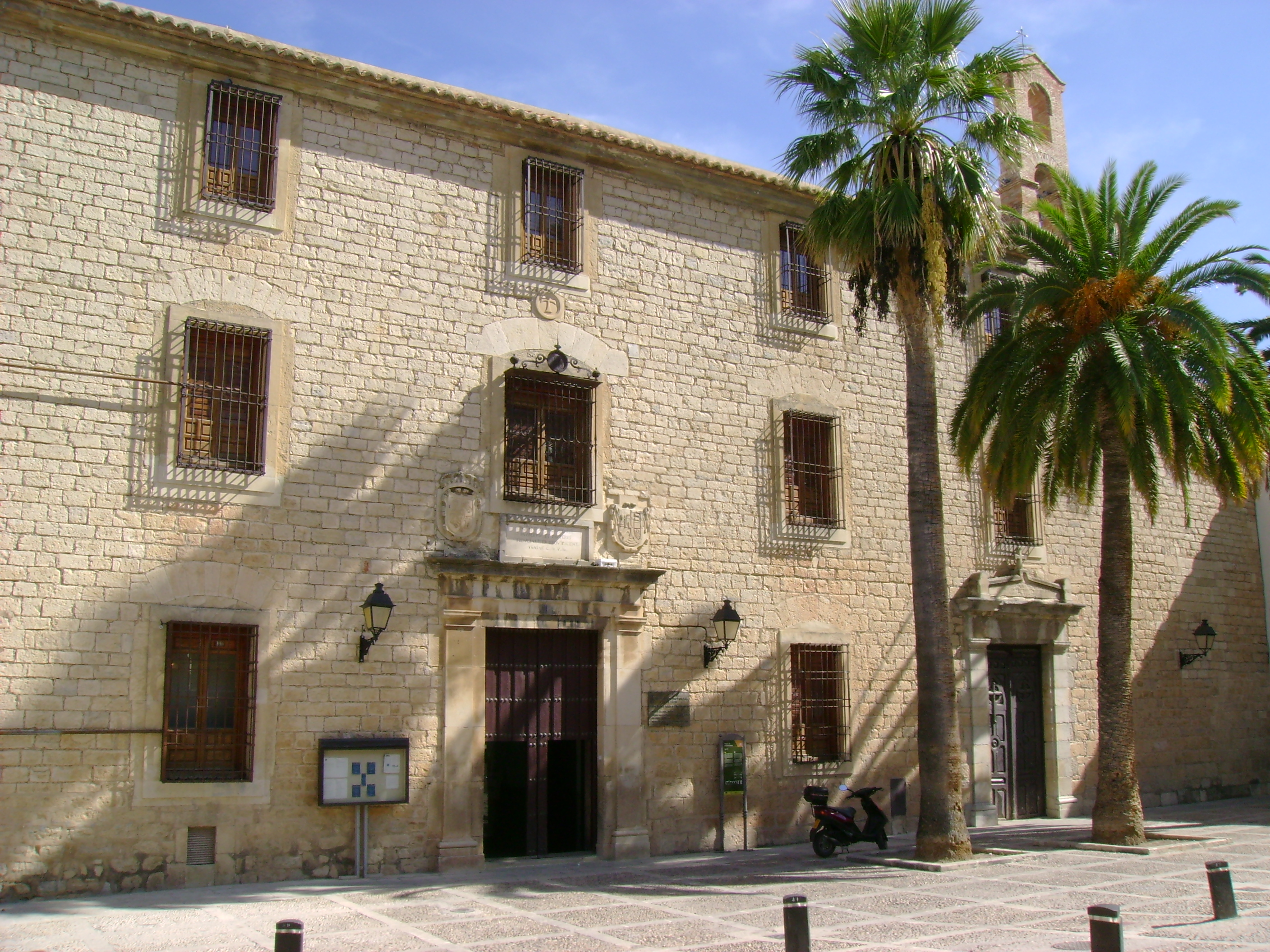 Palacio de Villardompardo. En su interior se alojan el Museo Internacional de Arte Naïf y los Baños Árabes.